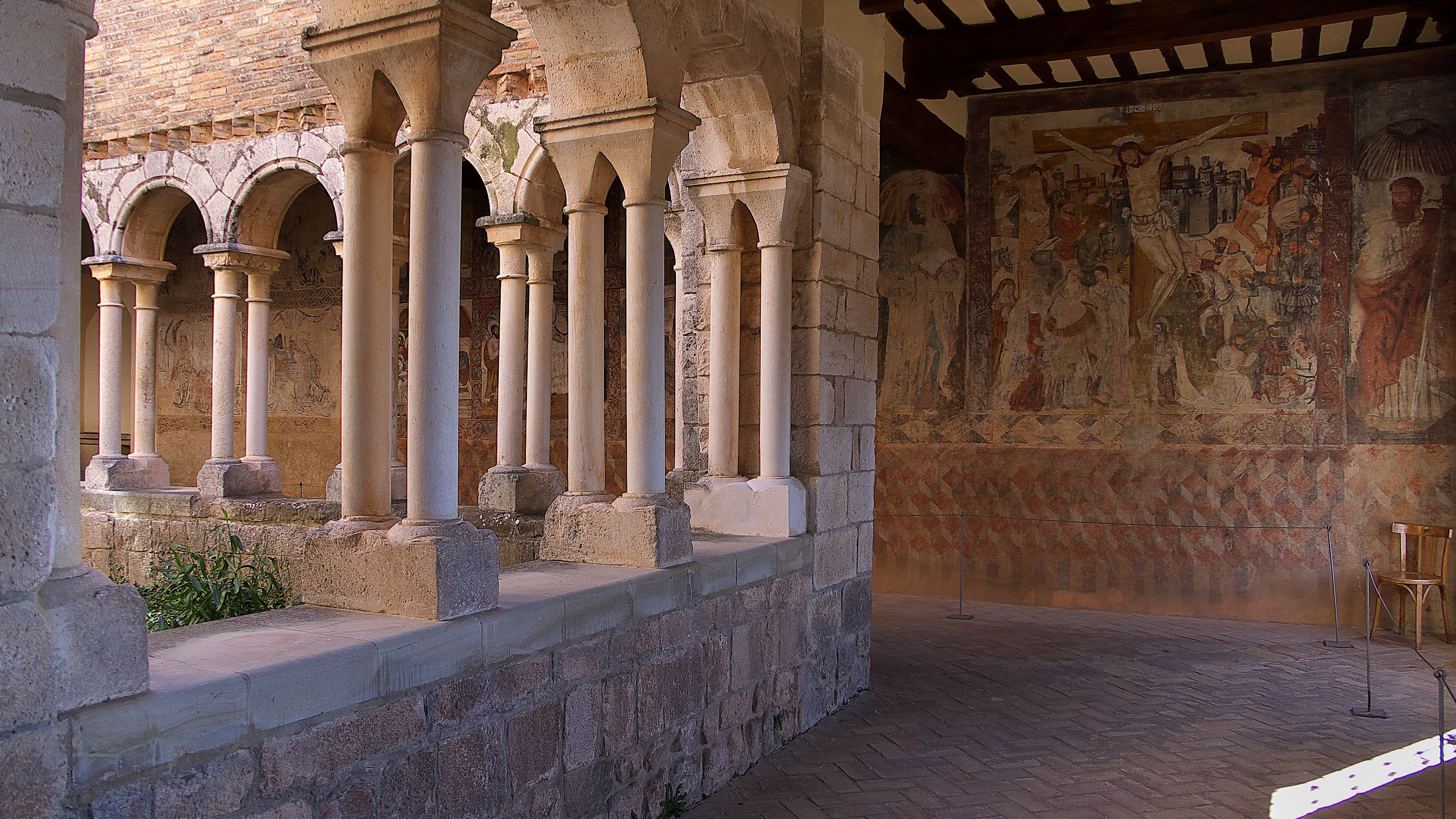 Las interesantes pinturas de los siglos XIV al XVIII.